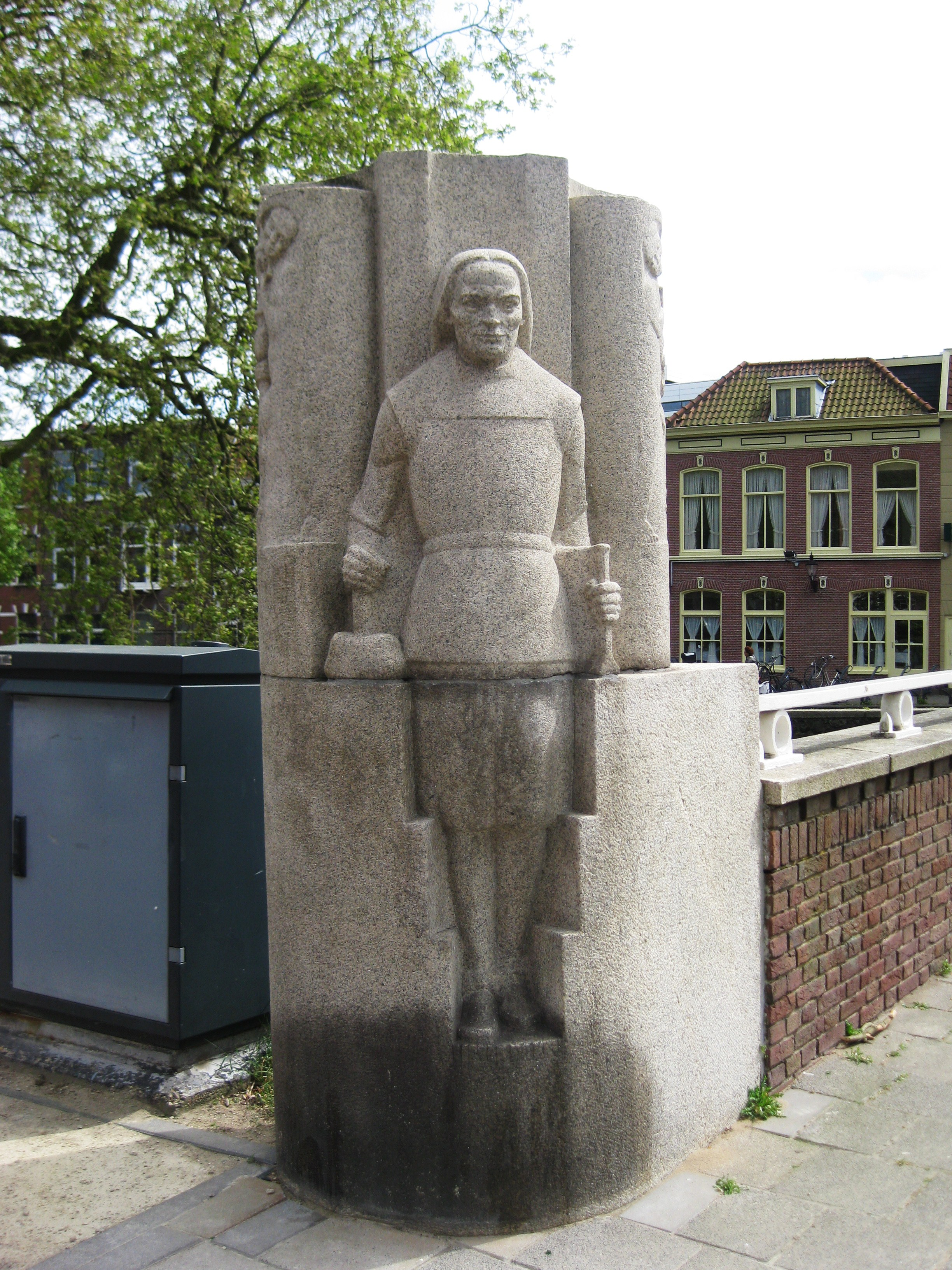 Lieven de Key, uitgebeeld met hamer en beitel door Hendrik van den Eijnde. Grote Houtbrug in Haarlem.1930